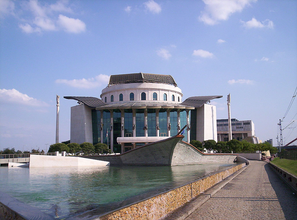 Budapest, Nemzeti Színház